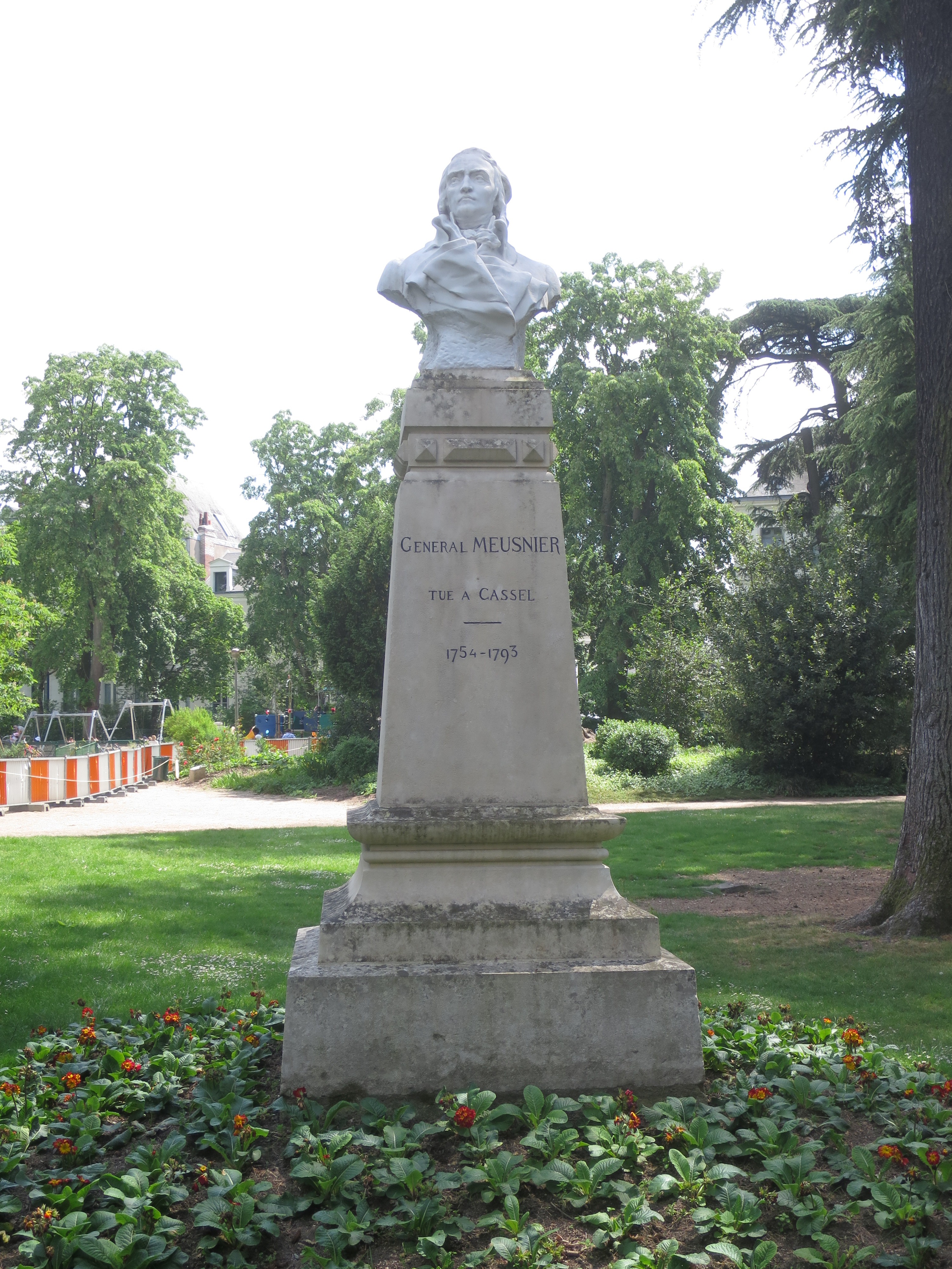 Monument de Général Jean-Baptiste Meusnier de la Place à Tours